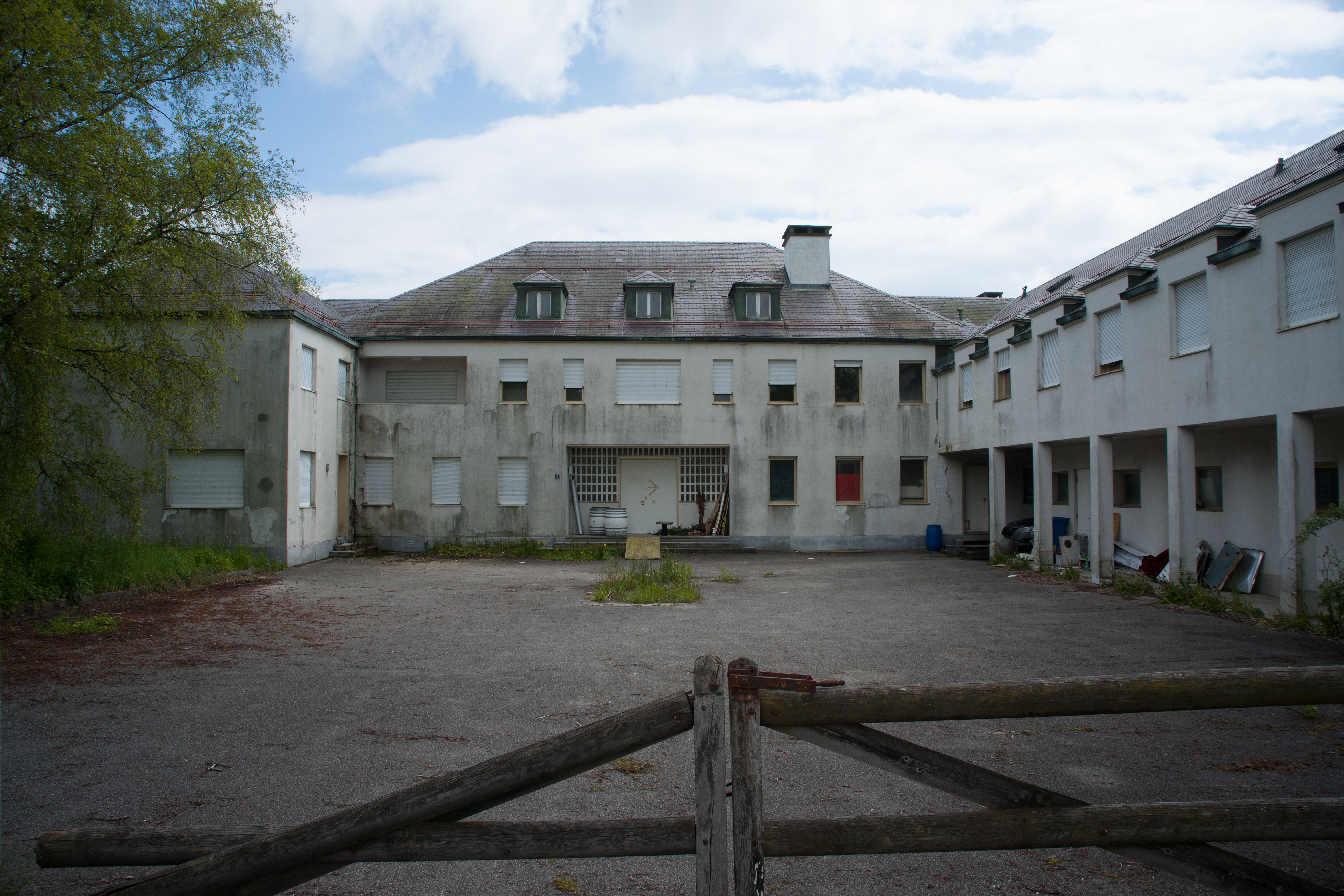 Maison de George Simenon - Epalinges (CH)